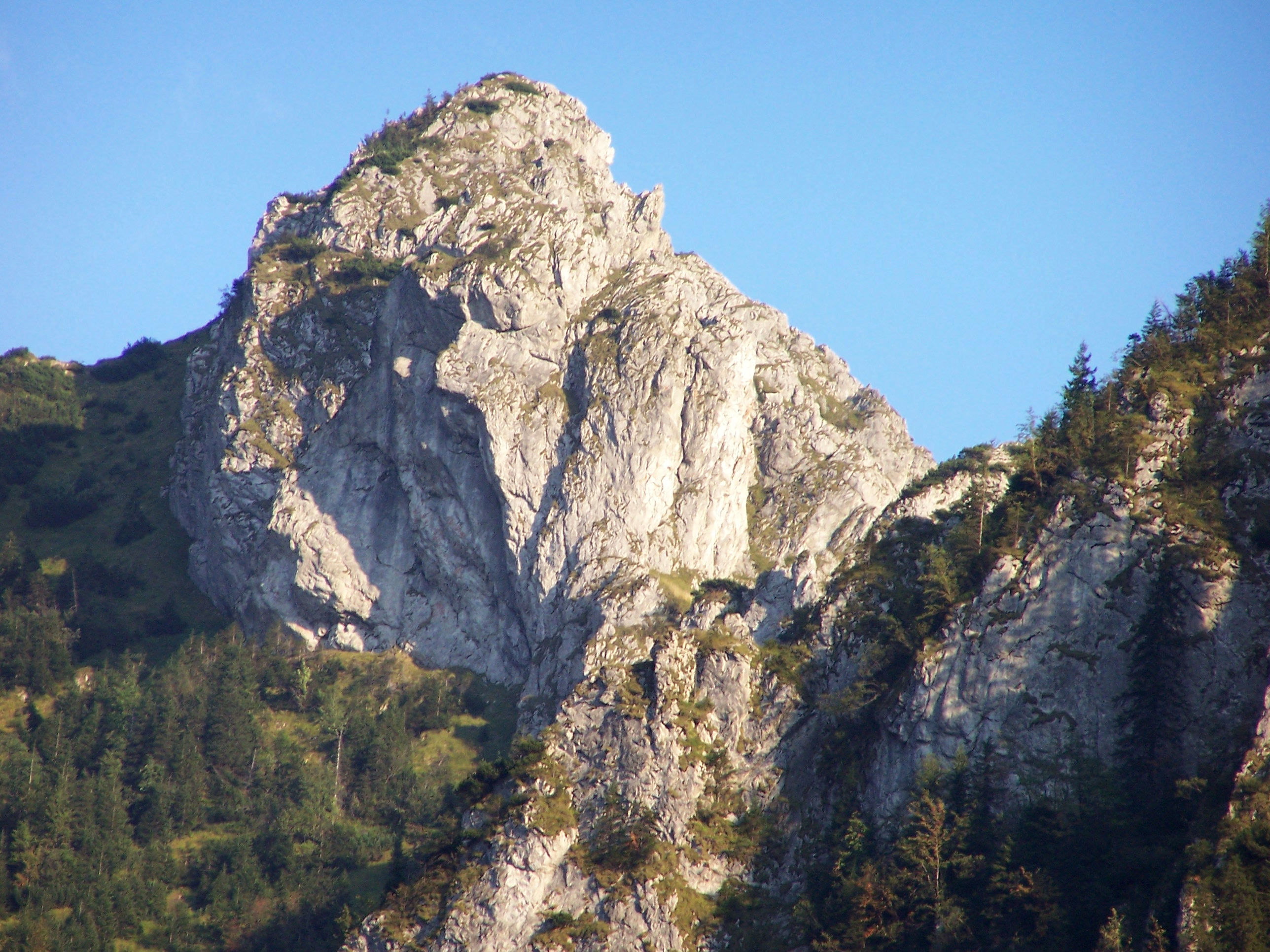 Upłazkowa Turnia (Tatry Mountains)